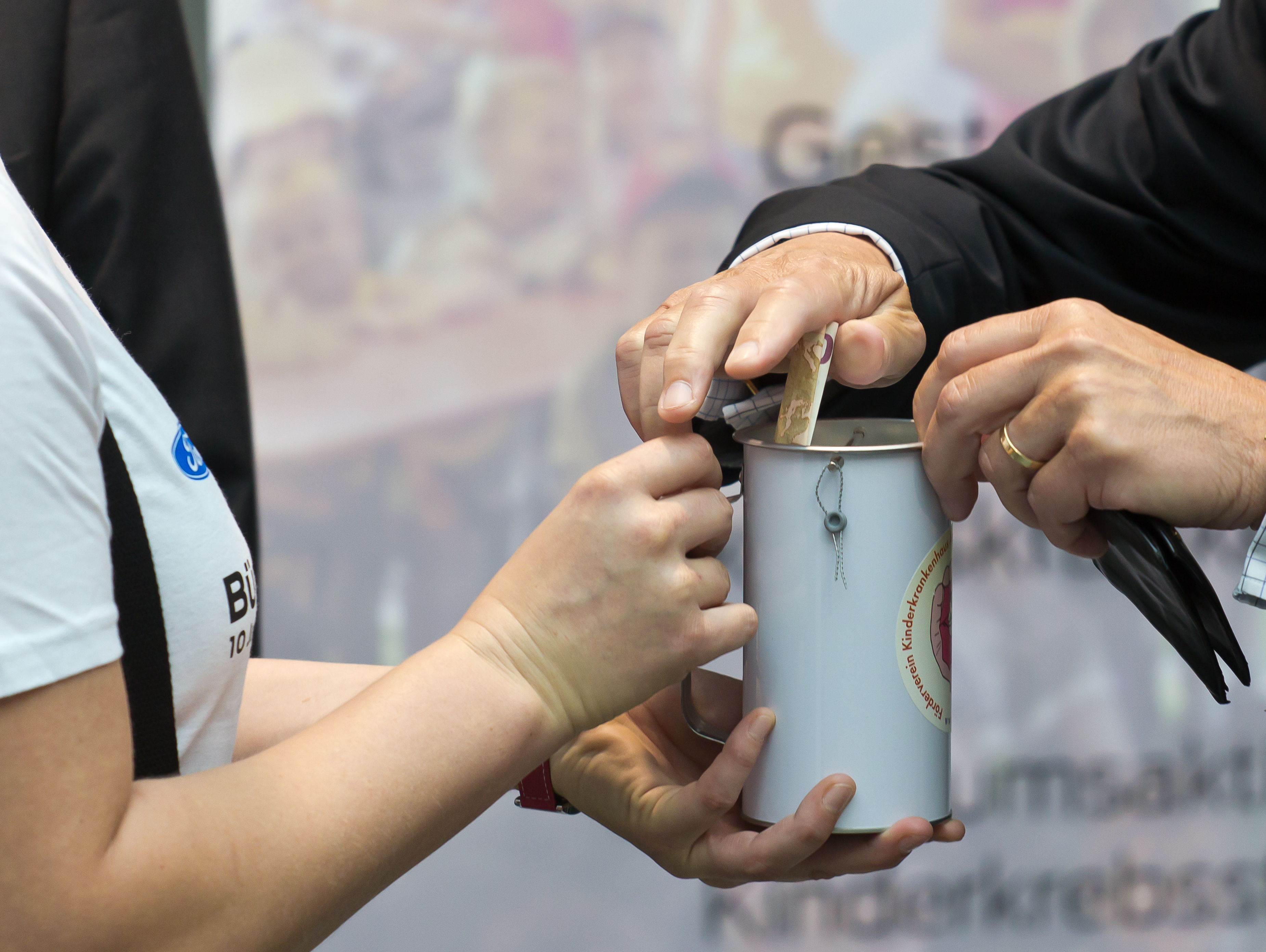 Start der Spendenaktion „Bündnis für Köln“ 2012 durch Oberbürgermeister Jürgen Roters und Ford-Geschäftsführer Bernhard Mattes im Kölner Rathaus. Der Erlös soll der Kinderkrebsstation der Kinderklinik an der Amsterdamer Straße zugute kommen. Foto: Ein 50-Euro-Schein wird als Spende in die Spendendose gesteckt.